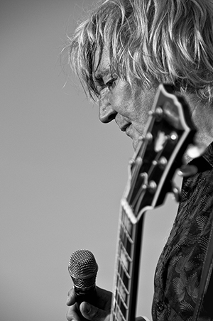 Jacques Higelin en concert, octobre 2011